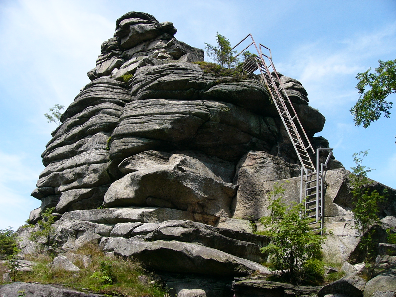 Hoher Stein, Felsformation auf dem Bergkopf (Waldsteinzug, Fichtelgebirge)